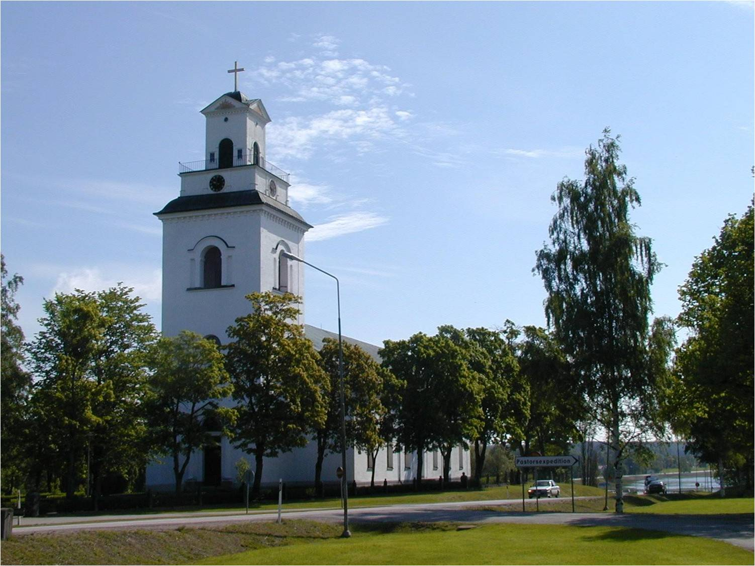 Forsa kyrka från sydväst. Riksväg 84 i förgrunden.